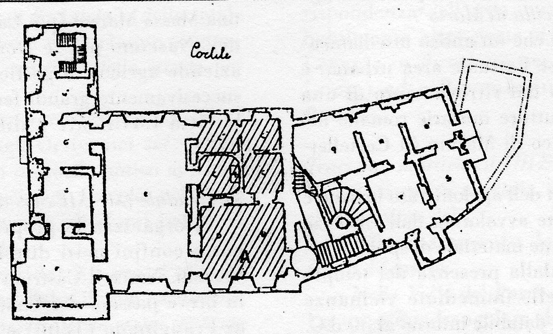 Pianta del piano nobile di Palazzo Colonna a Marino (RM) nel 1800